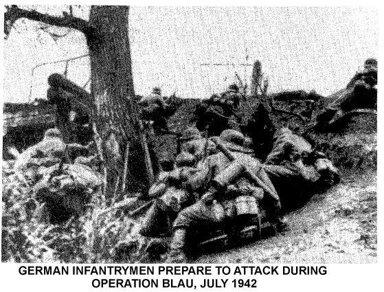 Quân Đức trong chiến dịch Blue 1942